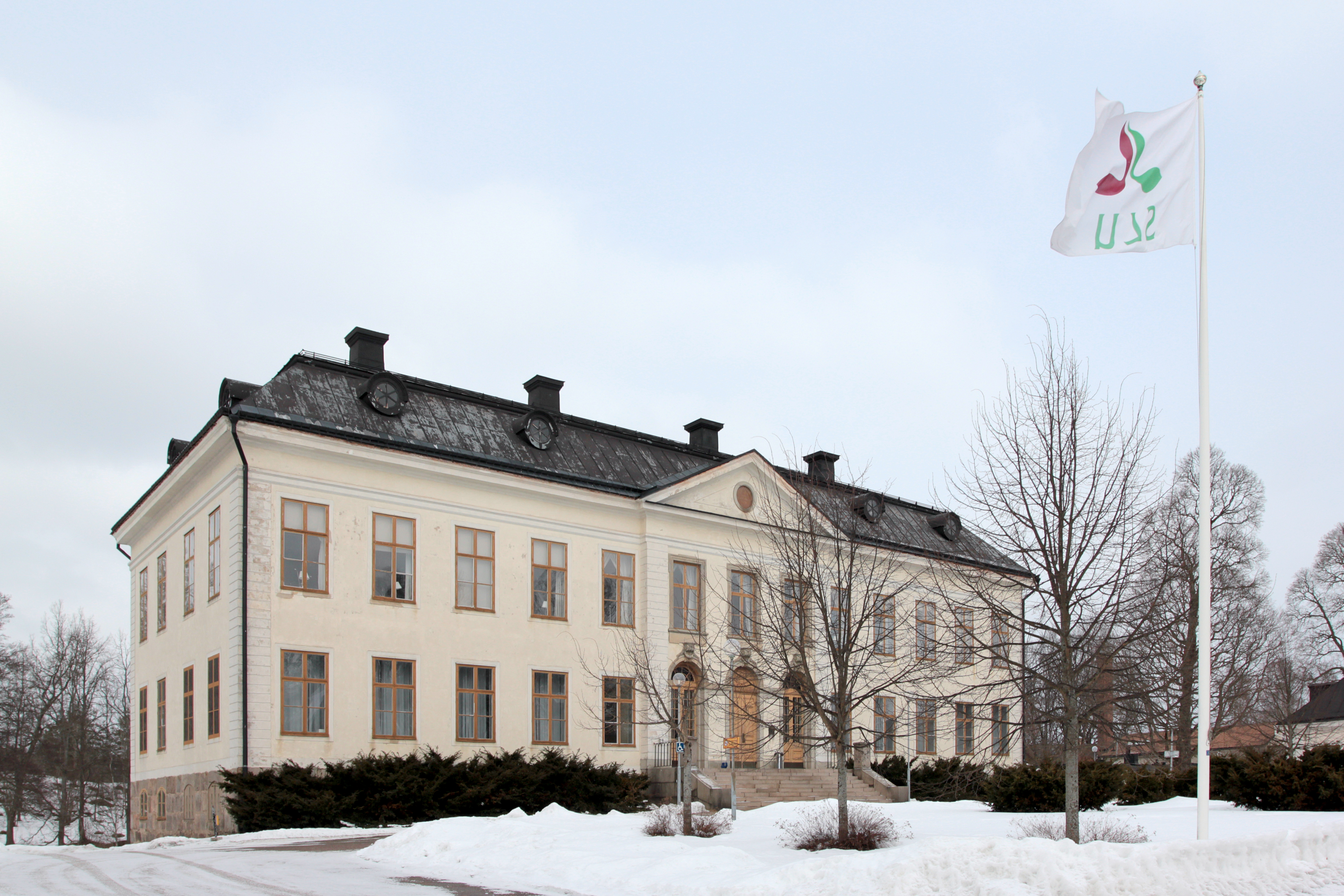 Skinnskattebergs herrgård, huvudbyggnaden, samt Sveriges lantbruksuniversitets flagga (sedd från baksidan, därför spegelvänd).